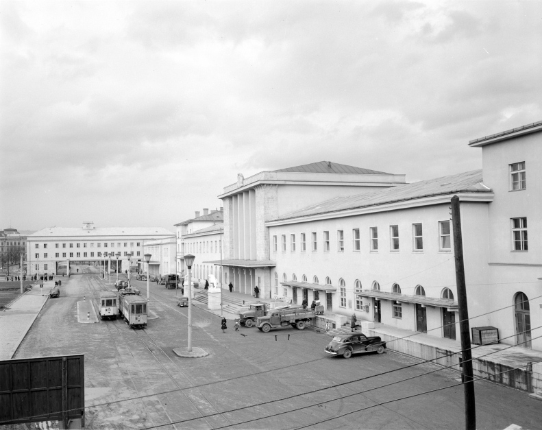 Gesamtansicht des Linzer Hauptbahnhofes mit dem Bahnhofsplatz. Blick aus dem Postgebäude.